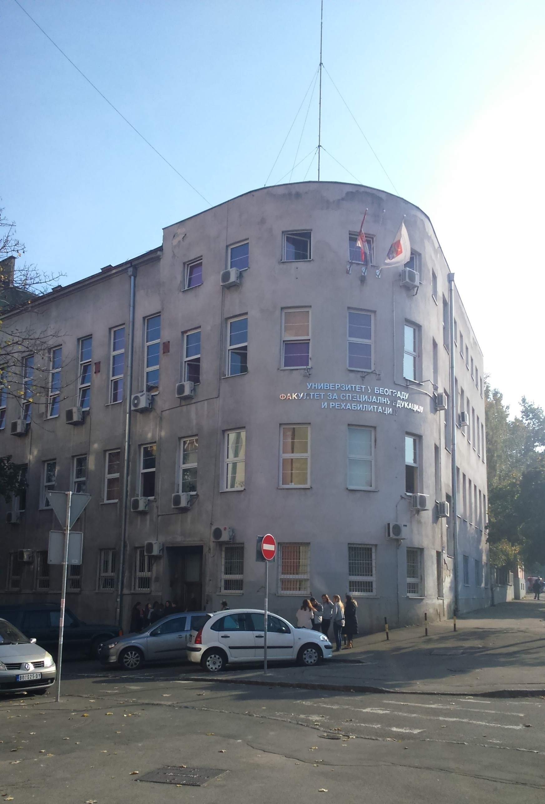 Факултет за специјалну едукацију и рехабилитацију Универзитета у Београду, зграда факултета.